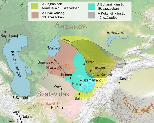 Kánságok a 16.-19. században, Hvárezm, Transzoxánia